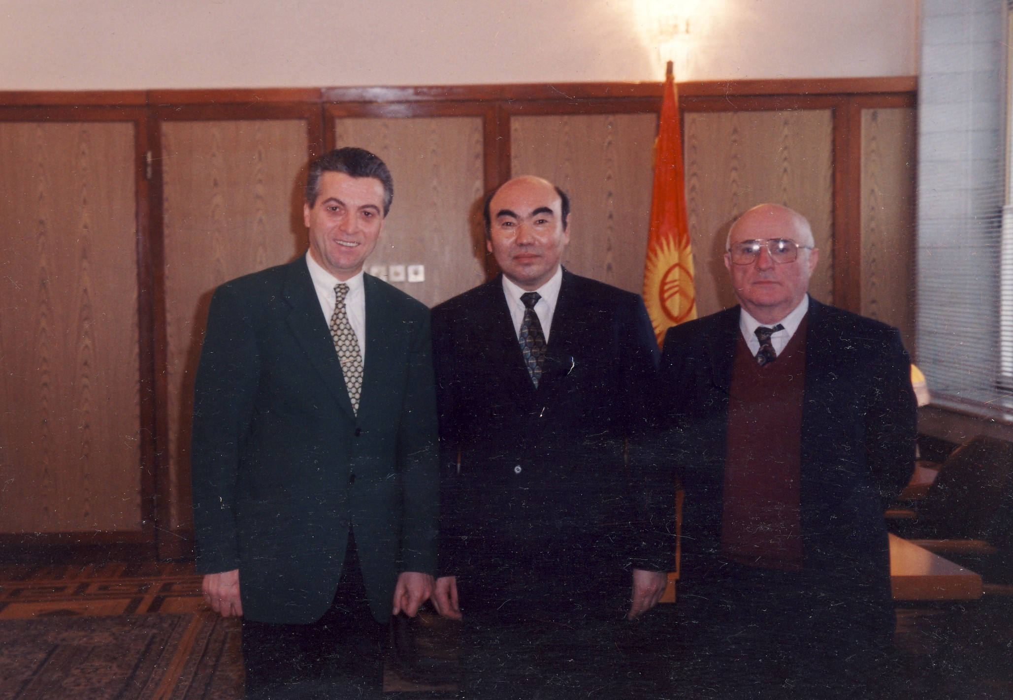 Частный визит профессора Л.Левитина в Кыргызстан по приглашению Президента Республики Аскара Акаева